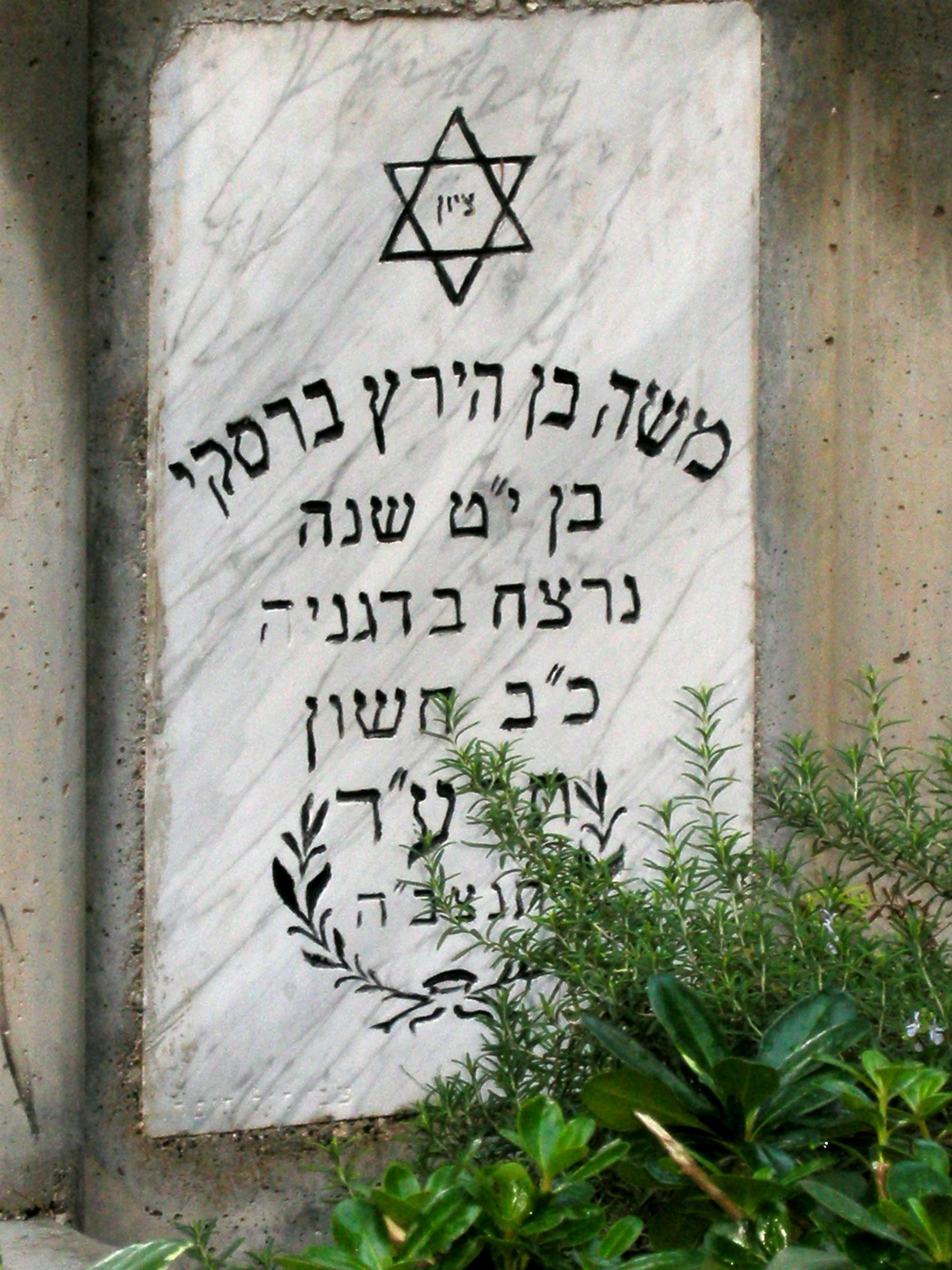 Degania Alef